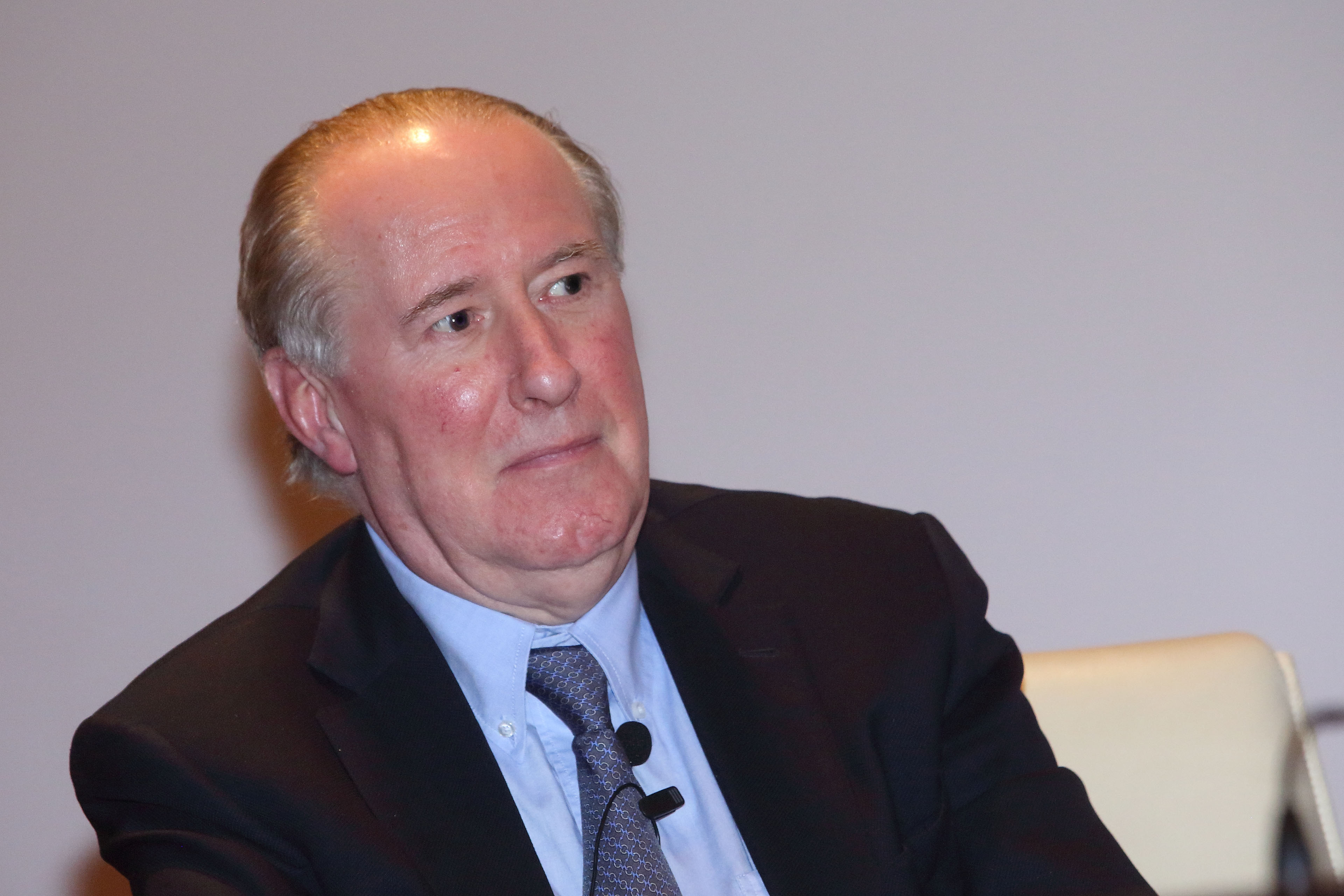 Toledo, 28 de noviembre de 2018.- El consejero de Hacienda y Administraciones Públicas, Juan Alfonso Ruiz Molina, clausura del acto institucional con el que la Sección de Toledo del Colegio de Economistas de Madrid conmemora el ‘Día del Economista’, en el Centro Cultural Liberbank. En la imagen, el profesor José María Gay de Liébana que pronunció una conferencia bajo el título “Oportunidades empresariales bajo la actual coyuntura económica”. (Foto: Álvaro Ruiz // JCCM)